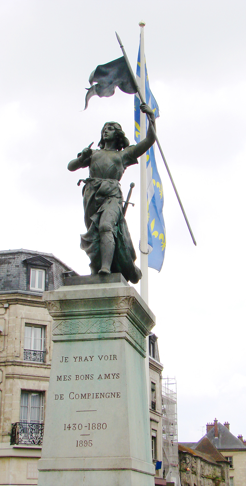 Statue de Jeanne d'Arc, face à l'Hôtel de Ville de Compiègne, par Étienne Leroux, 1879